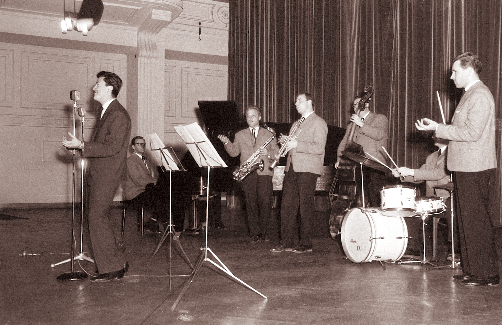 Koncert orkestra Nikice Kalodjere s pevci v Mariboru - Tihomir Petrović